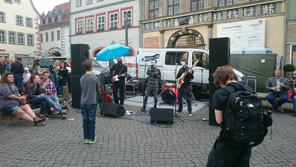 TRAUMFRESSER beim Fête de la Musique 2016 in Erfurt